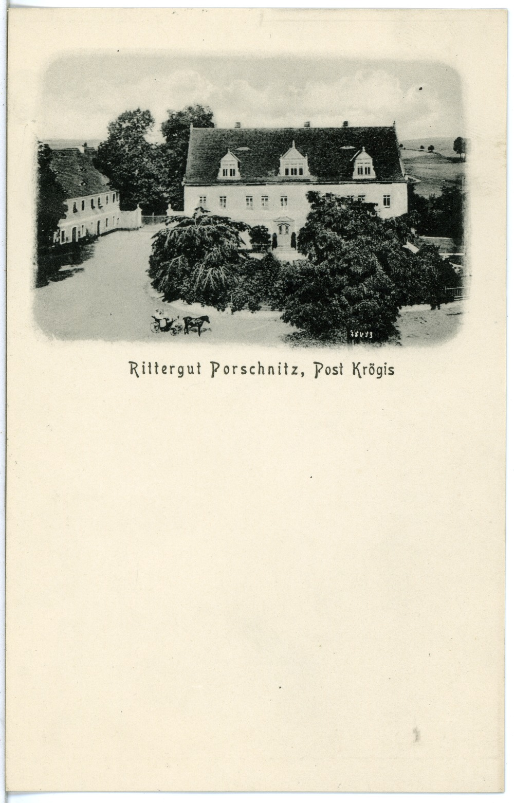 Porschnitz; Rittergut This postcard is from publisher Brück & Sohn in Meißen ( postcard has a unique number 20195 and is available in a higher resolution at the publisher. This images was uploaded in a cooperation project between Wikipedians and the publisher.